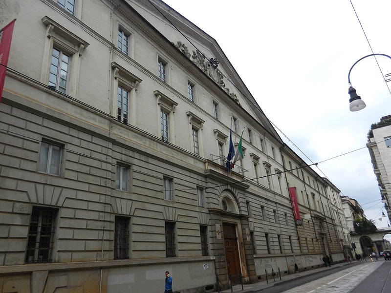 Torino - Accademia Albertina